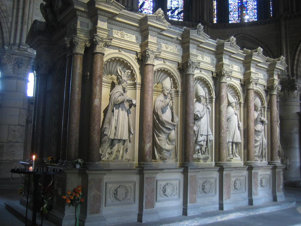 Tombeau de Saint Remi dans la basilique Saint Remi à Reims (Marne - Champagne-Ardennes)